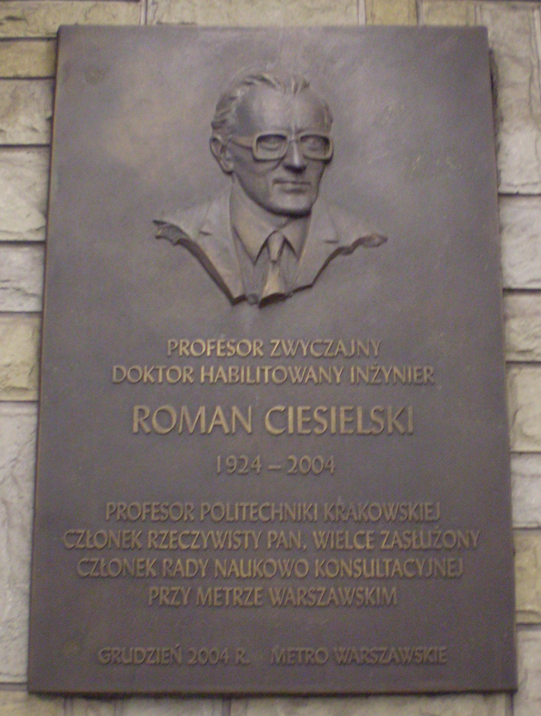 tablica pamiątkowa na stacji metra politechnika